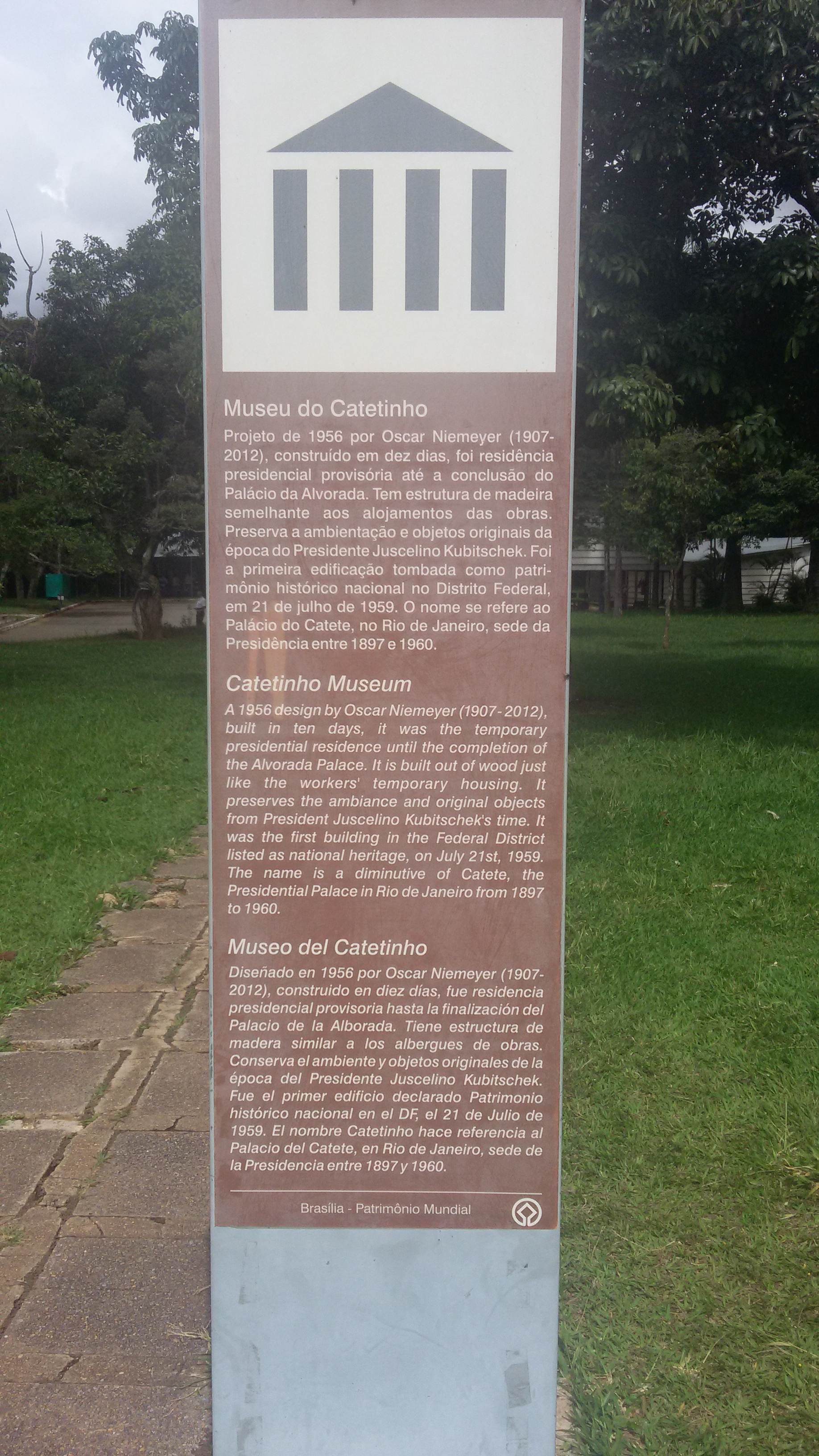 la placa se queda en la entrada del museo.